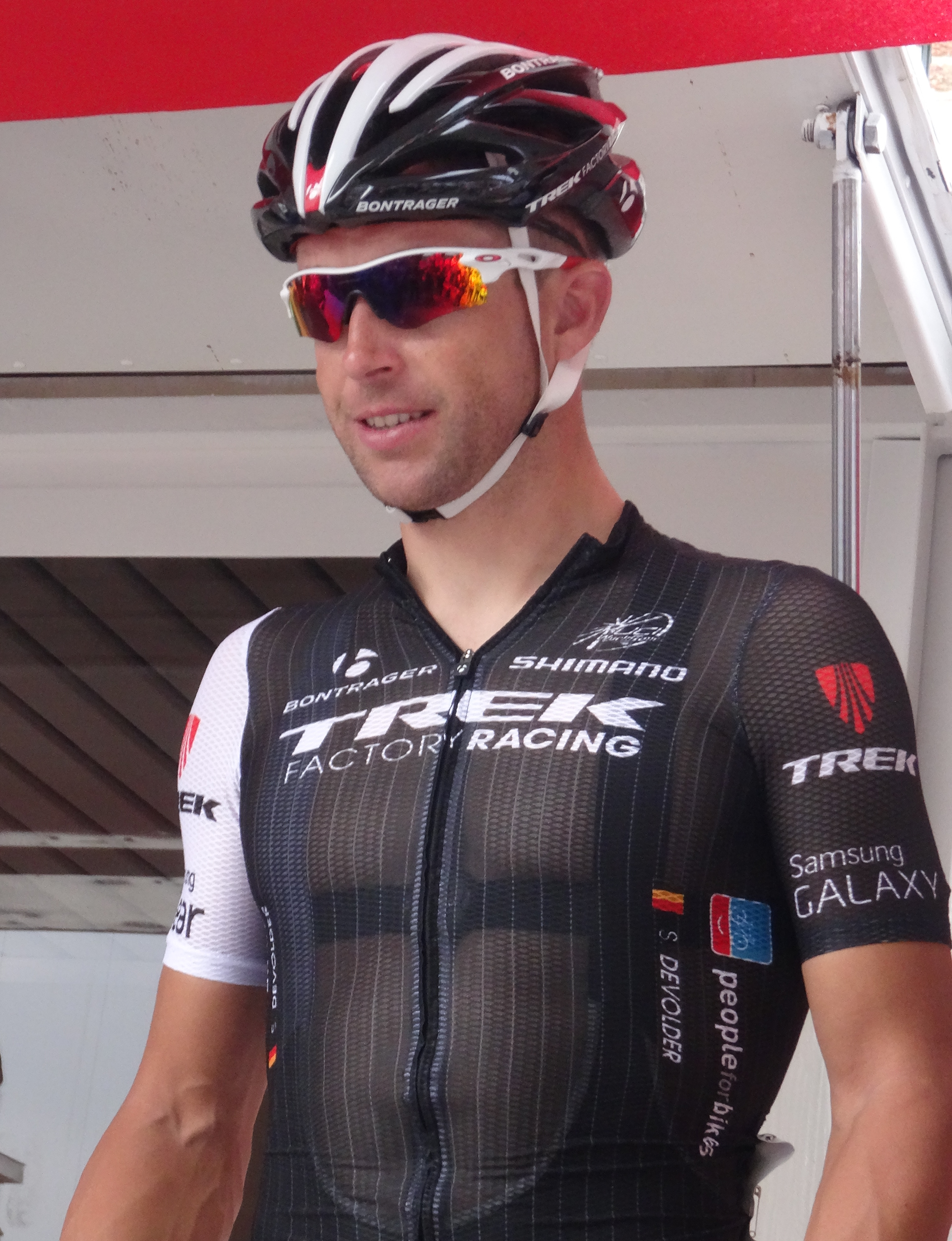 Reportage photographique réalisé le samedi 26 juillet à l'occasion du départ de la première étape du Tour de Wallonie 2014 à Frasnes-lez-Anvaing, Belgique.